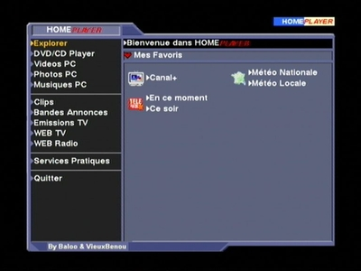 Copie d'écran du mod Freeplayer HomePlayer